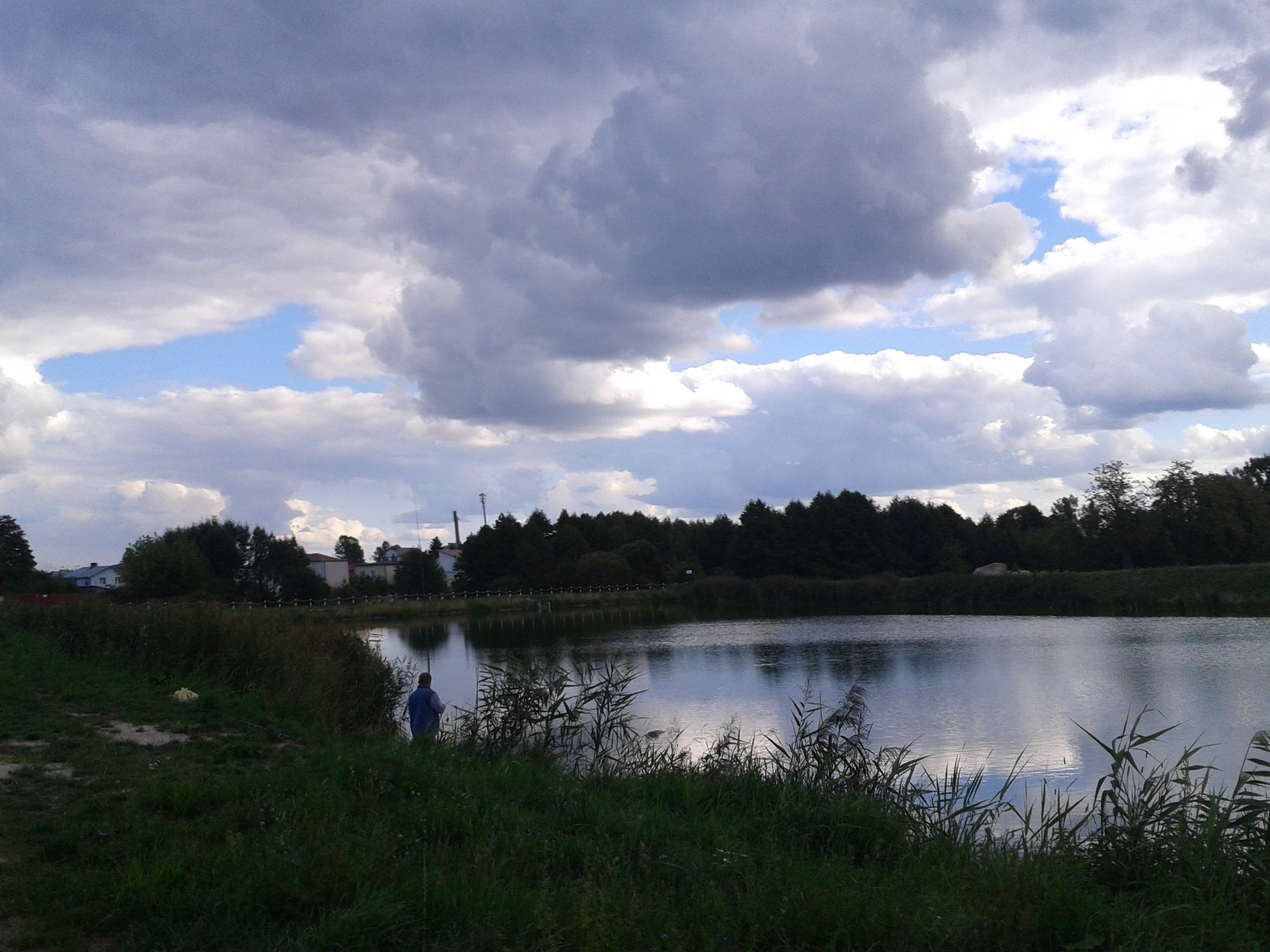 Białystok, Stawy Dojlidzkie przy ulicy Fredry